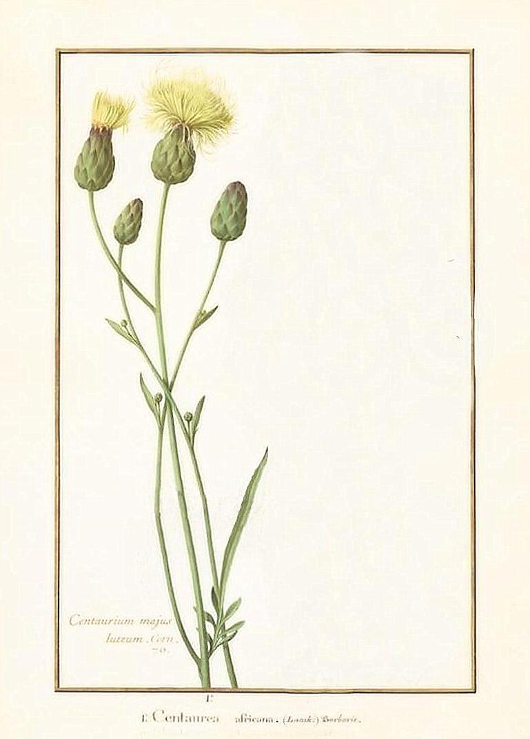 Rhaponticoides africana, como Centaurium majus luteum.